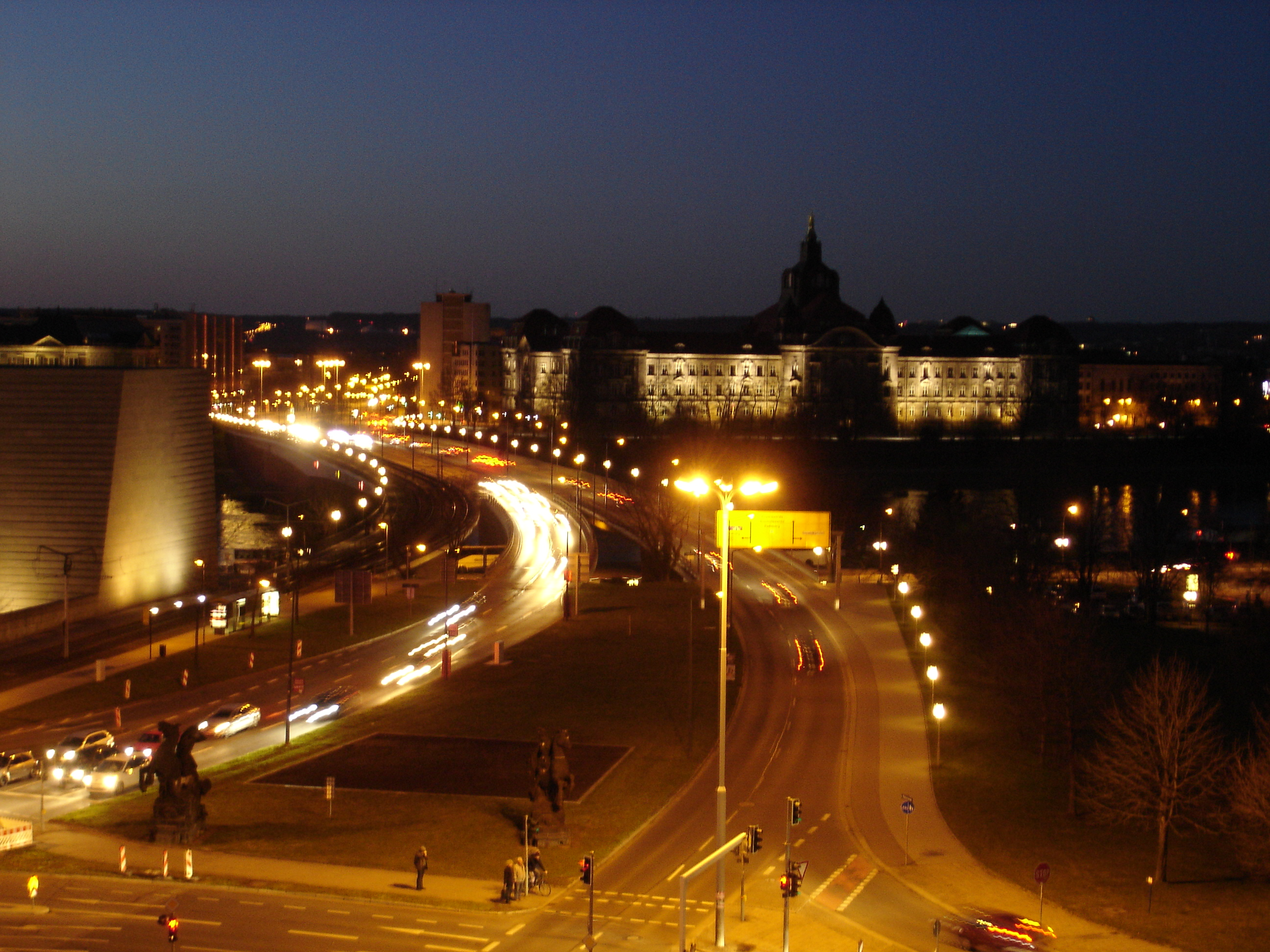 Dresden: Carolabrücke, links: Neue Synagoge, hinten: Staatskanzlei